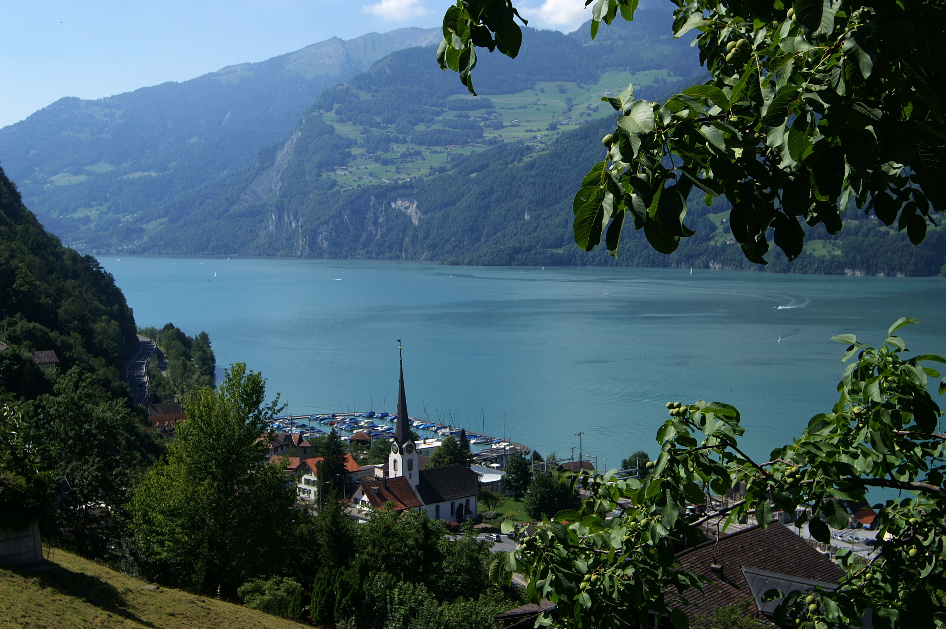 die Gemeinde Mühlehorn ist unterhalb des Kerenzerberges am Südufer des Walensees gelegen.